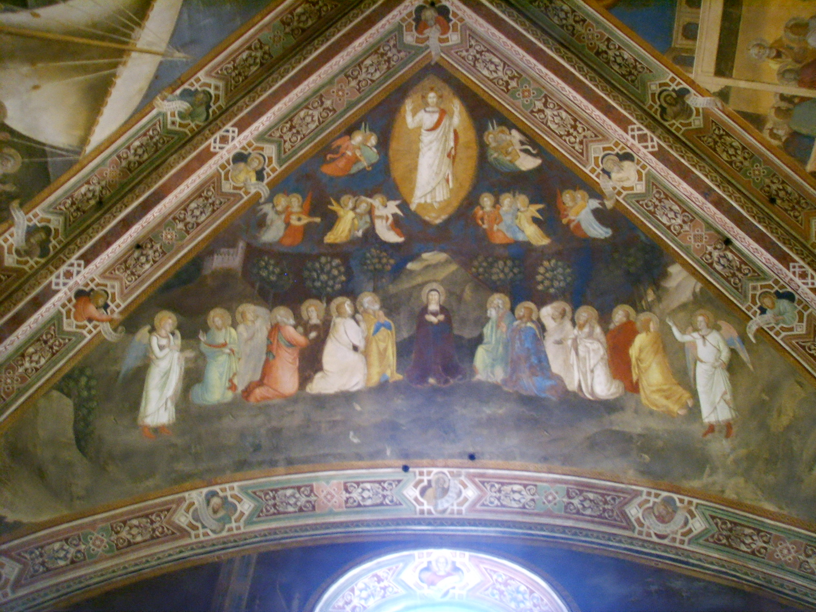 Santa Maria Novella church, Cappellone degli Spagnoli (Big Chapel of Spanish), fresco by Andrea di Bonaiuto, in Florence, Italy